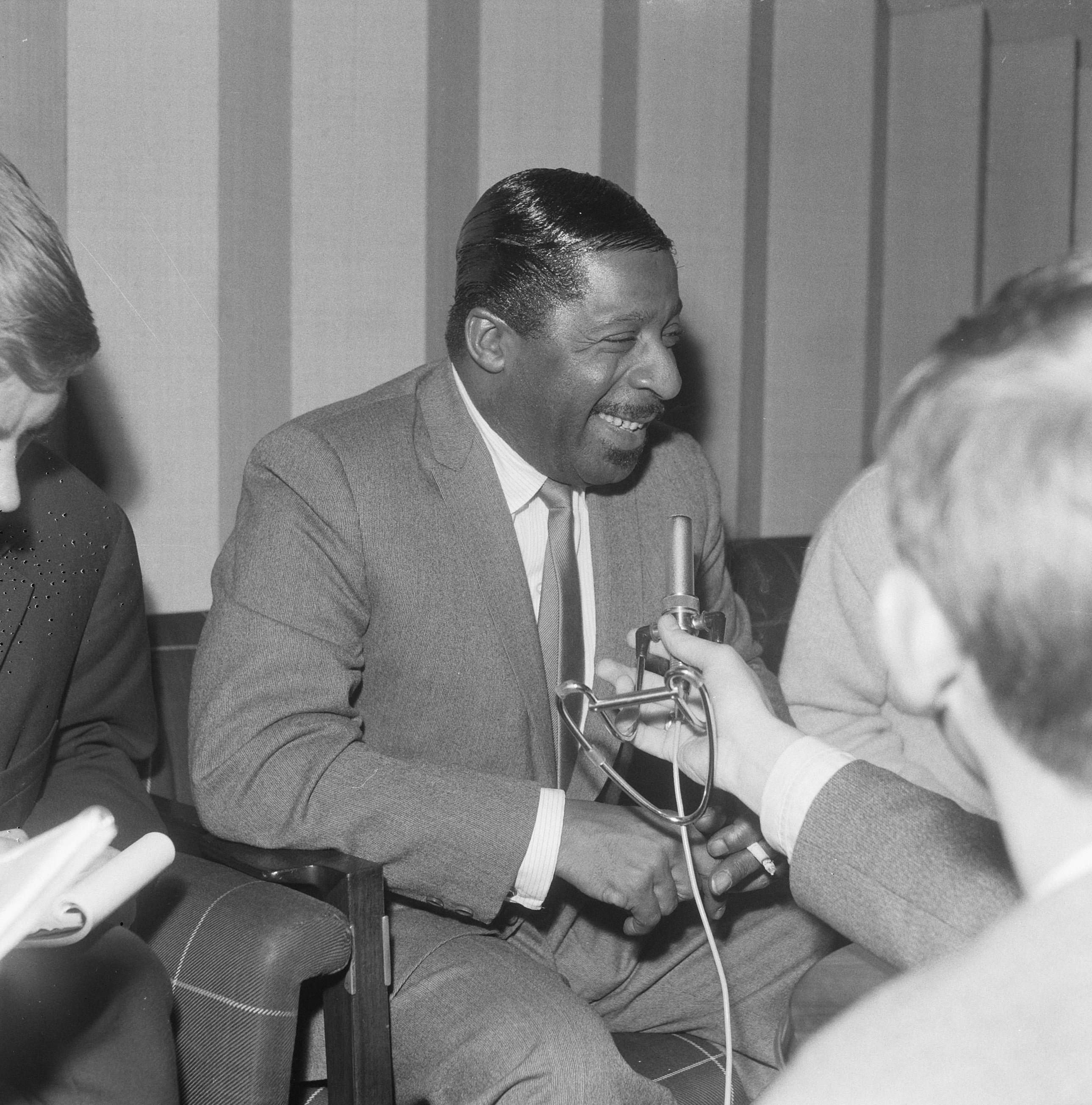 Collectie / Archief : Fotocollectie Anefo Reportage / Serie : [ onbekend ] Beschrijving : Erroll Garner in Amsterdam, hier in Amstelhotel tijdens cocktailparty, Erroll Garner Datum : 5 november 1964 Locatie : Amsterdam, Noord-Holland Trefwoorden : Cocktailparty's Persoonsnaam : Erroll Garner Instellingsnaam : Amstelhotel Fotograaf : Gelderen, Hugo van / Anefo Auteursrechthebbende : Nationaal Archief Materiaalsoort : Negatief (zwart/wit) Nummer archiefinventaris : bekijk toegang 2.24.01.03 Bestanddeelnummer : 917-0984